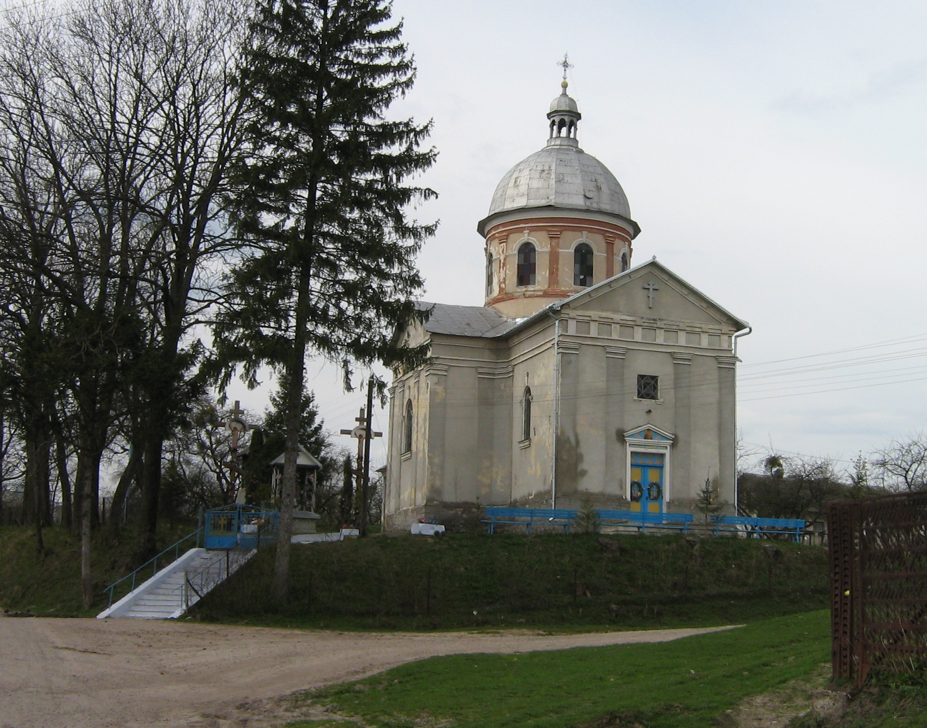 Церква Пресвятої Трійці, Гологори